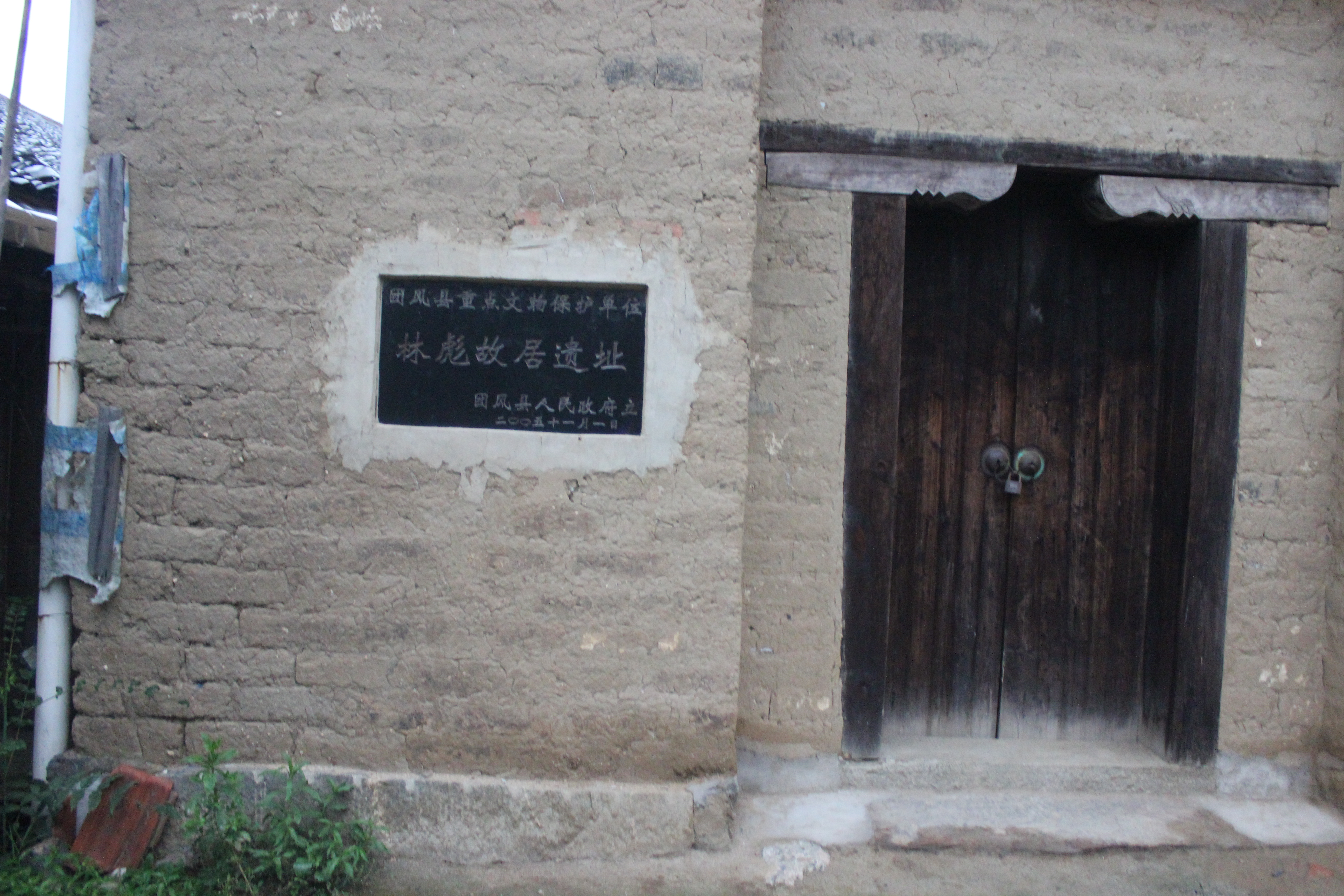 林家大湾，我们的伟人故里。我们的中华人民共和国军事家，政治家